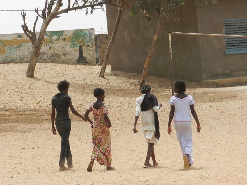 Studentesse si recano alla scuola Daara di Malika (Dakar)